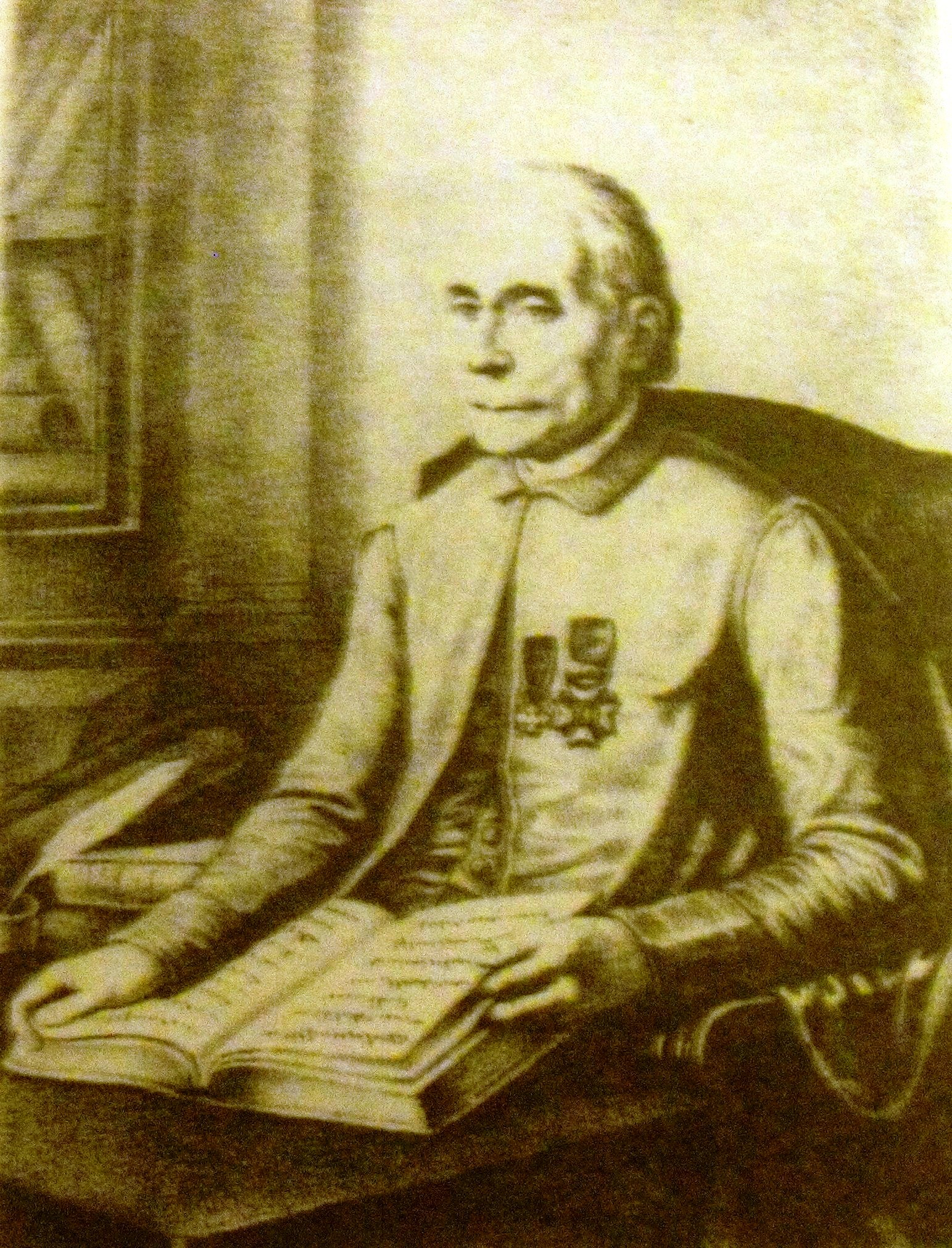 Ritratto di Giovanni Rossi, sacerdote e prefetto della Biblioteca Borbonica di Napoli, realizzato dal cav. Camillo Guerra nel 1867.